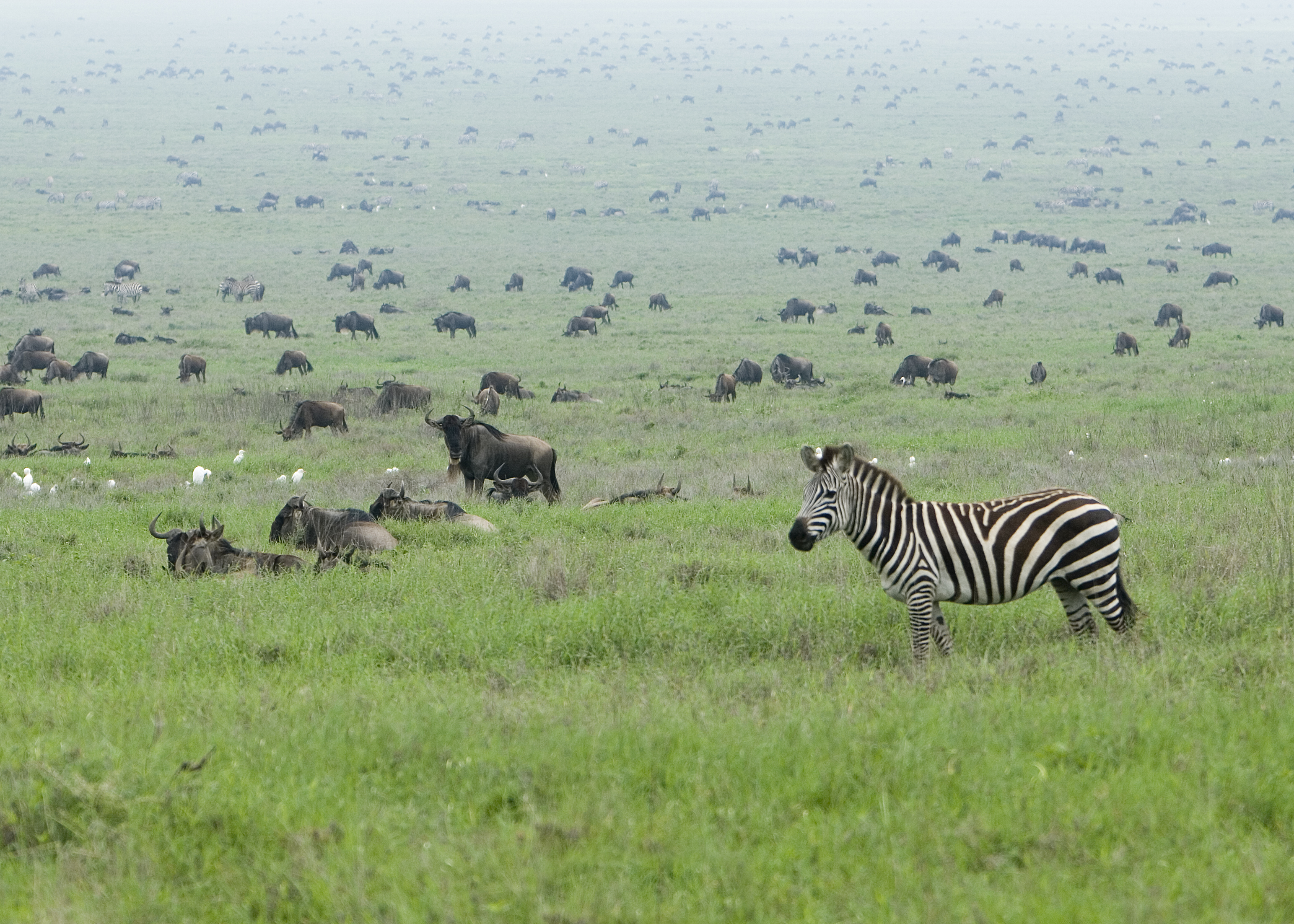 Zebras and wildebeests in Serengeti National Park, Tanzania